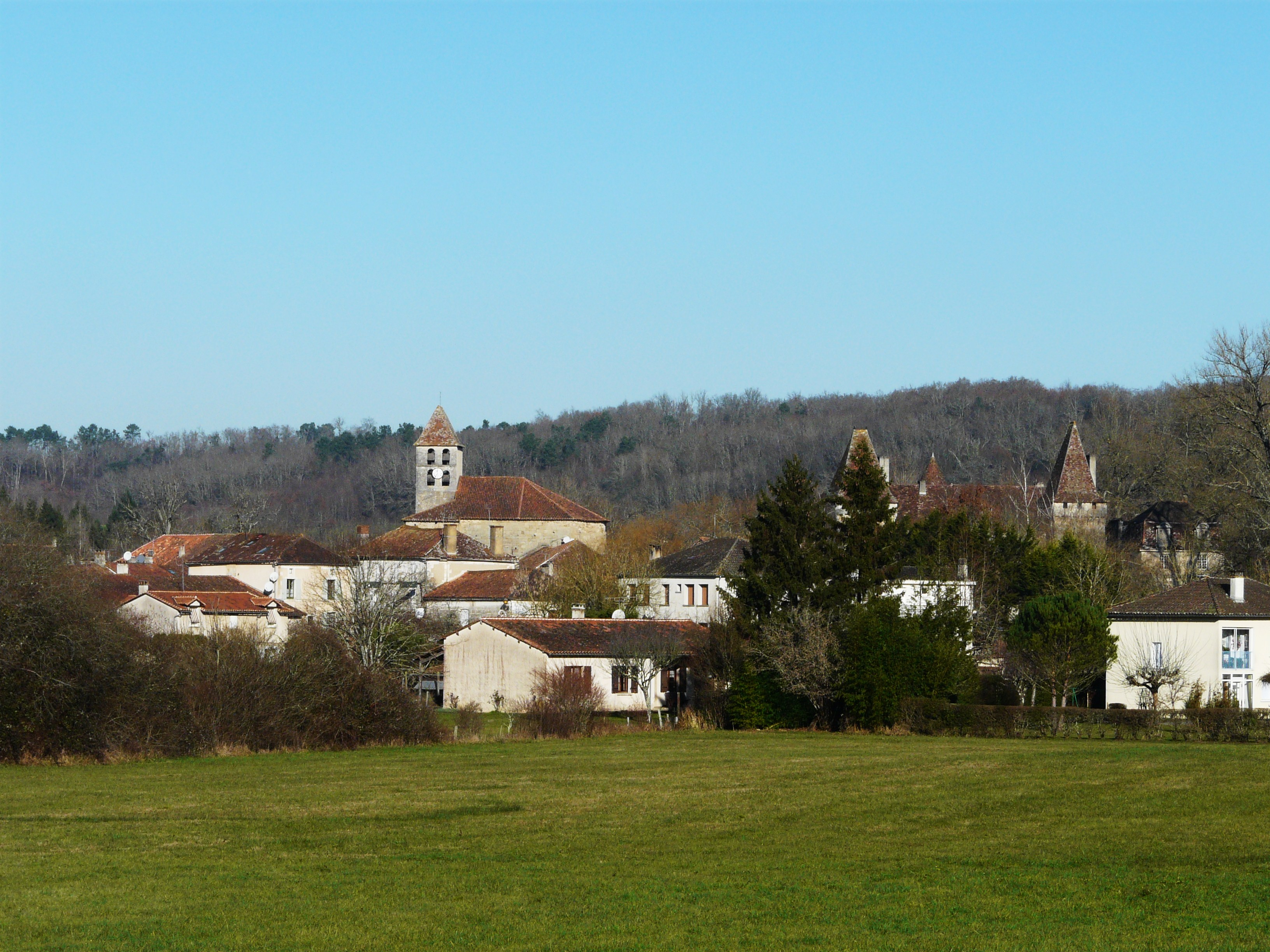 Vue générale de Saint-Jean-de-Côle, Dordogne, France